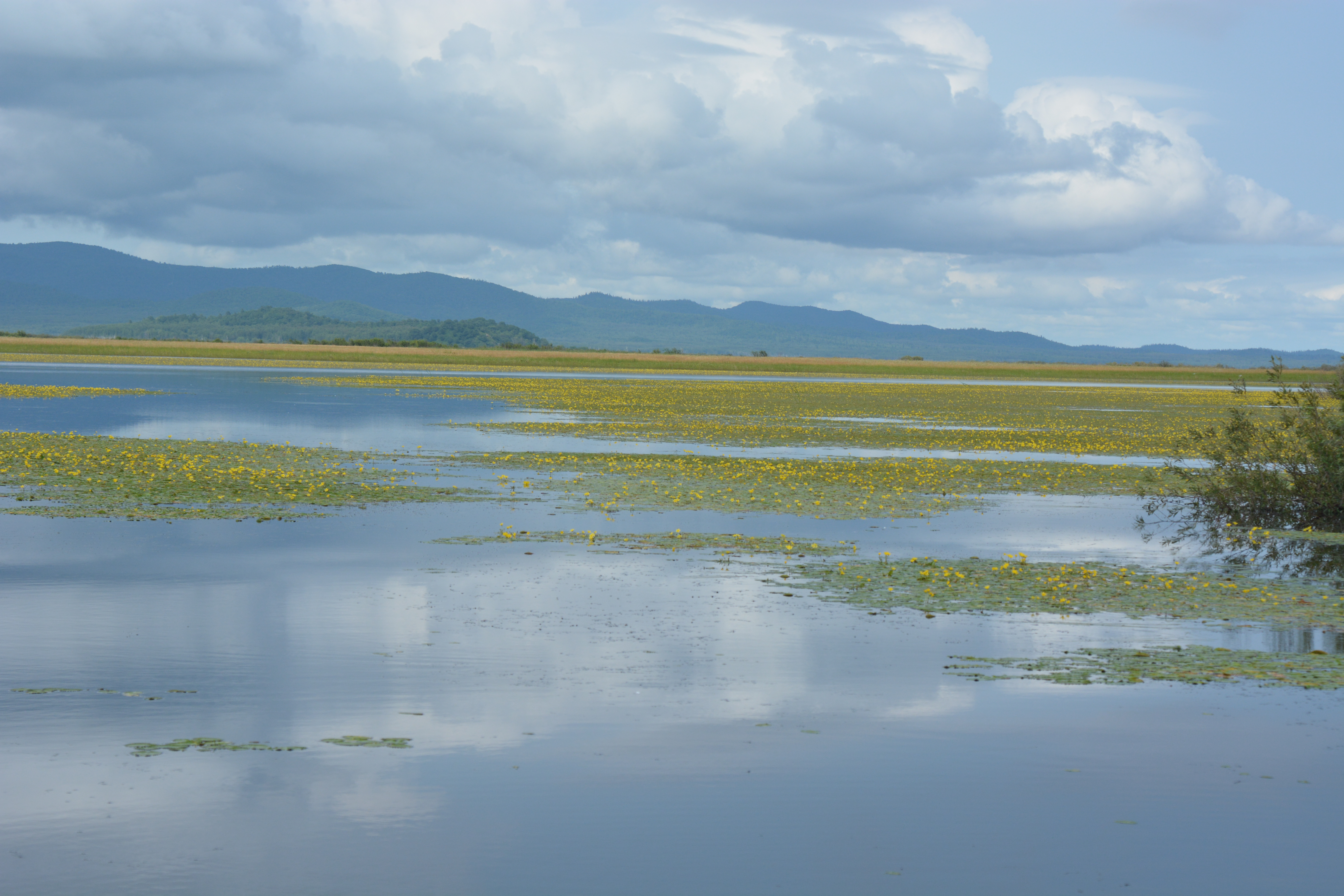 Болоньский заповедник: Заповедник находится в наиболее низкой части Средне-Амурской низменности и охватывает низовья (устьевую часть) бассейна р. Симми и ряда других, впадающих с запада в оз. Болонь. Заповедник расположен в Амурском и Нанайском районах Хабаровского края, Амурский район, Хабаровский край This image is related to the protected area of Russia number 2700007